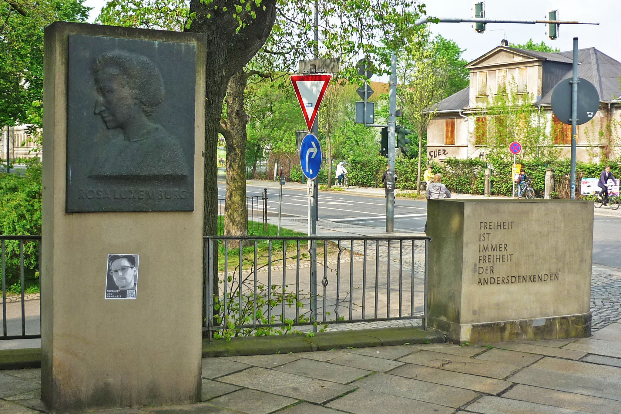 Stele mit Rosa-Luxemburg-Plakette am Rosa-Luxemburg-Platz in Dresden